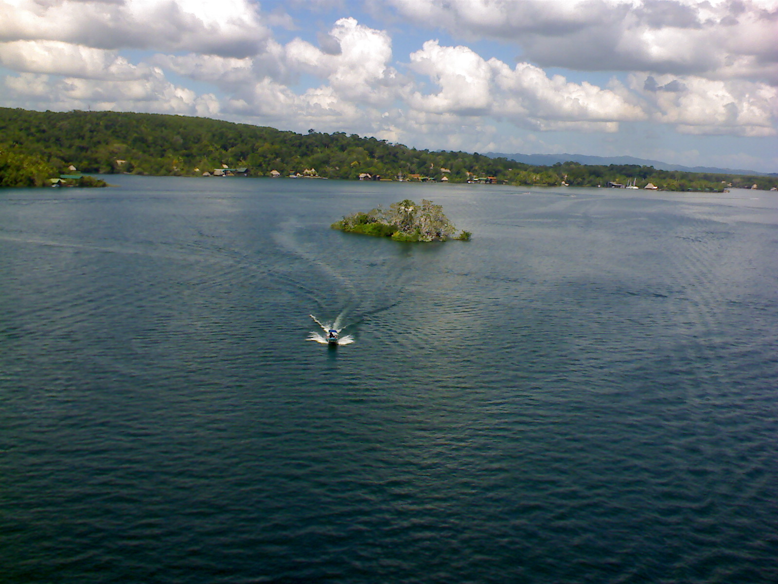 Desde el puente hacia la entrada del rio.